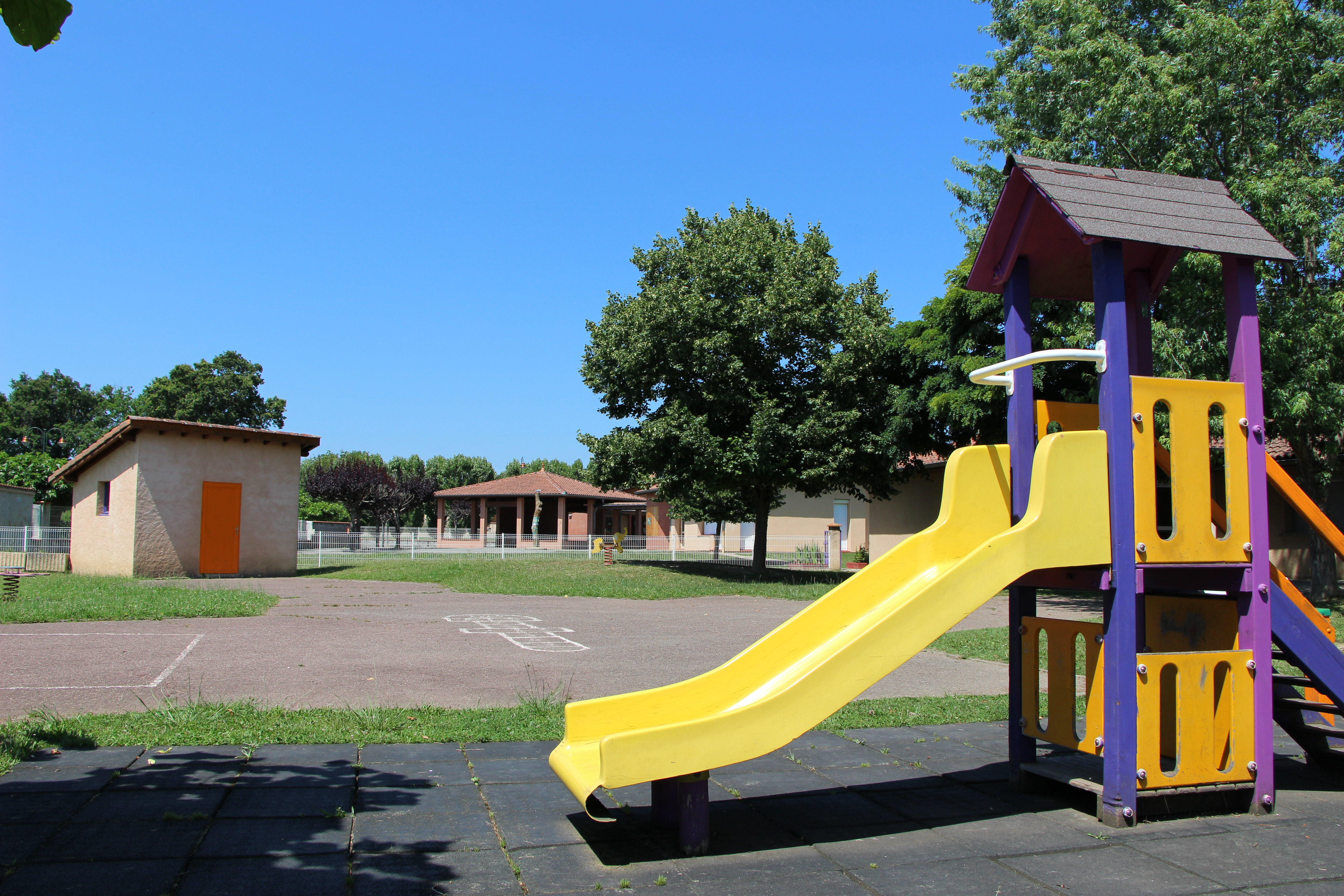 Ecole maternelle et primaire